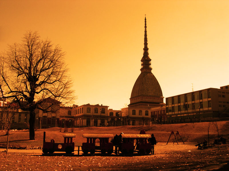 Torino, ItaliaMole Antonelliana (Torino).